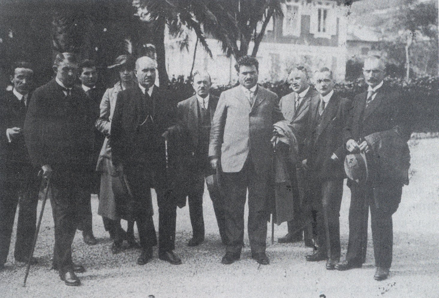 Българската делегация на Конференцията в Генуа